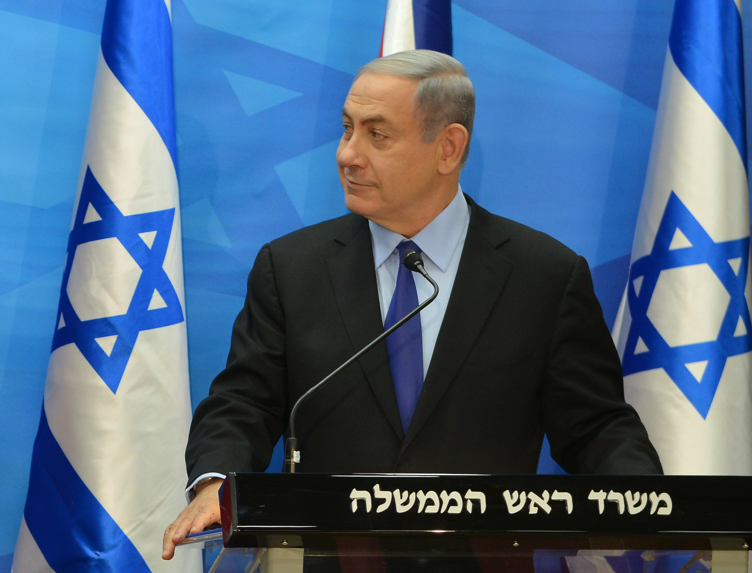 Prime Minister Benjamin Netanyahu.